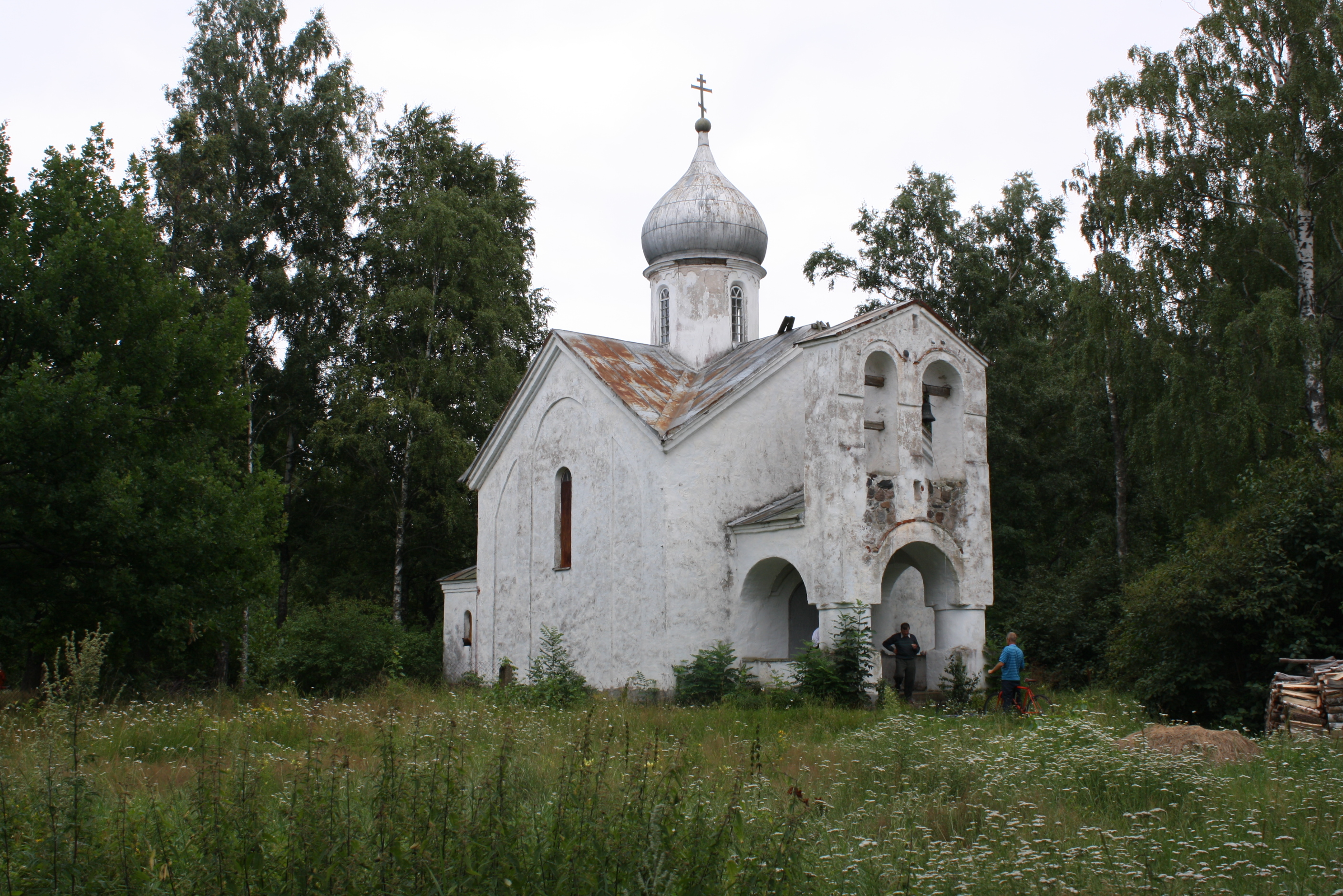 Piirissaare kirik